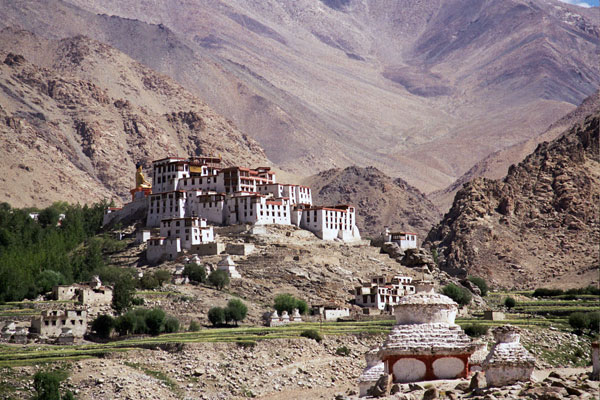 Gompa de Likir, a Ladakh (Jammu i Caixmir, Índia)